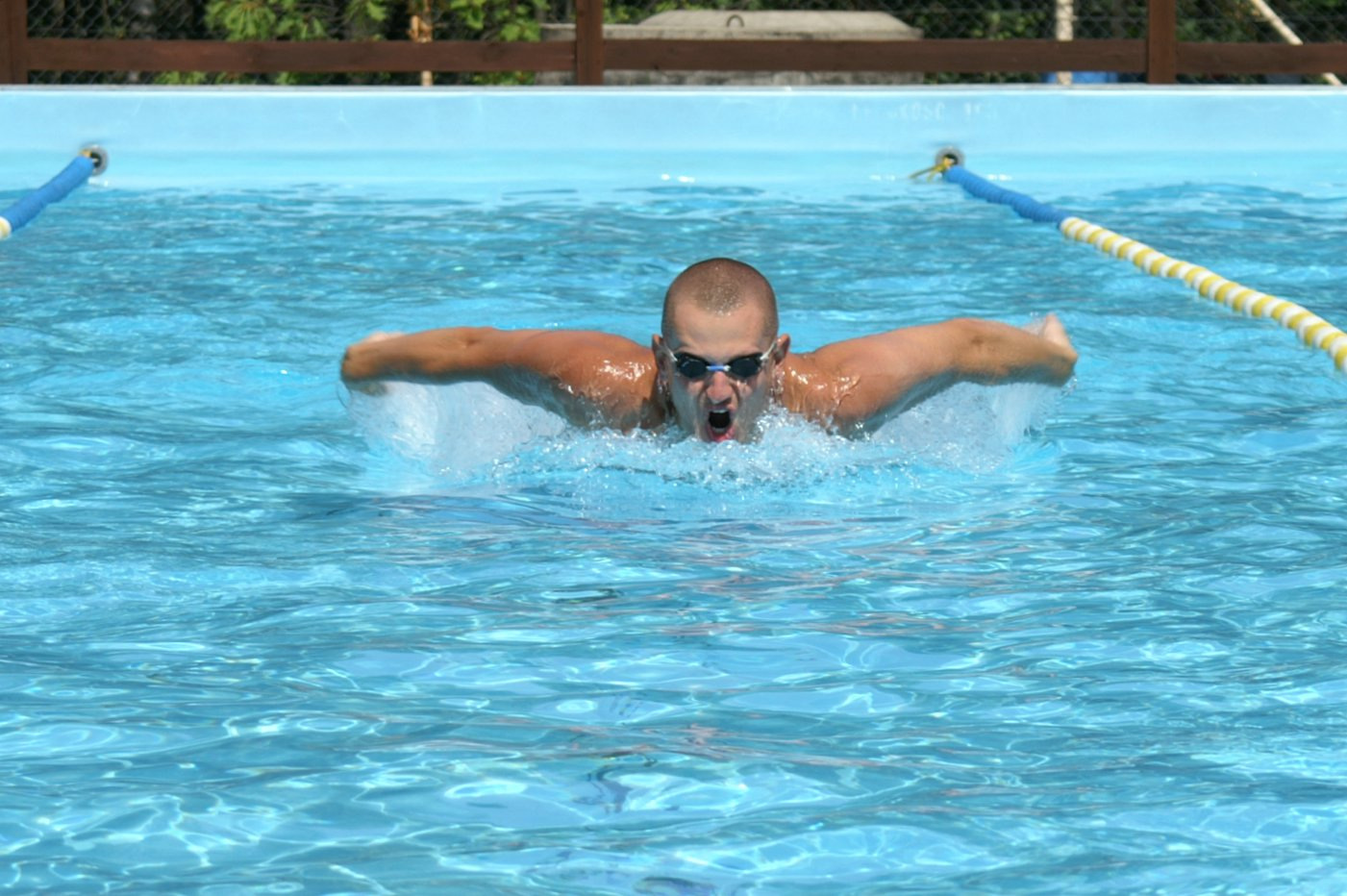 Pływak płynący stylem motylkowym